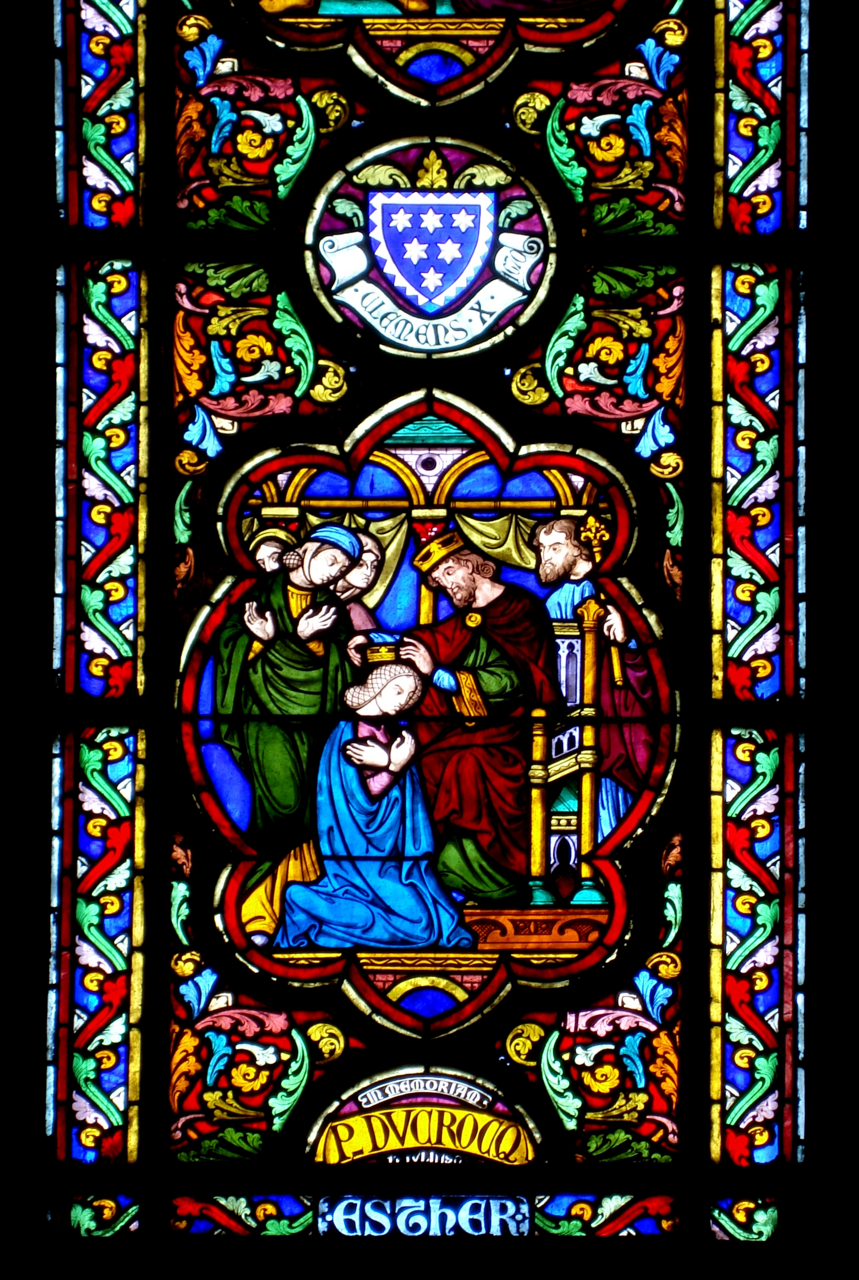 Portion de vitrail de la cathédrale Notre-Dame-de-la-Treille à Lille (Nord), représentant la reine Esther de l'ancien testament.